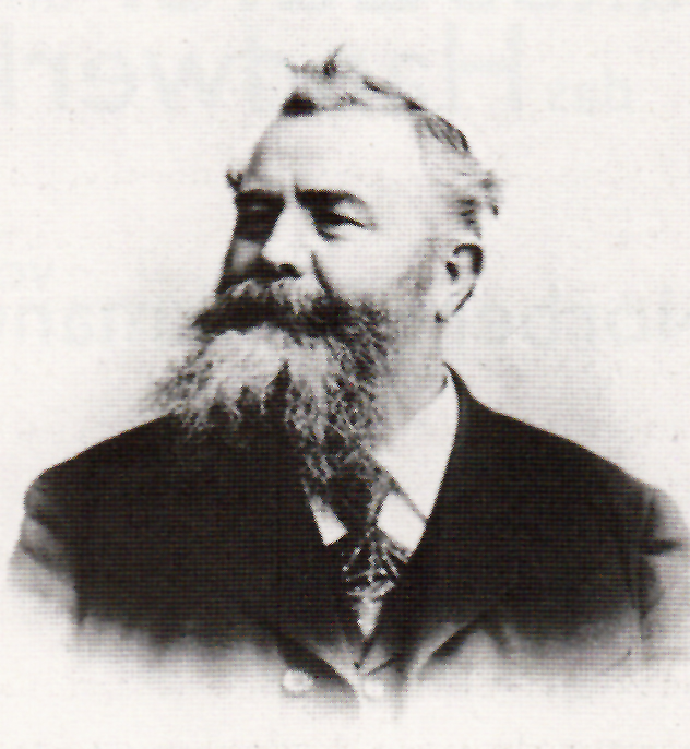 Porträt von Jakob Euler